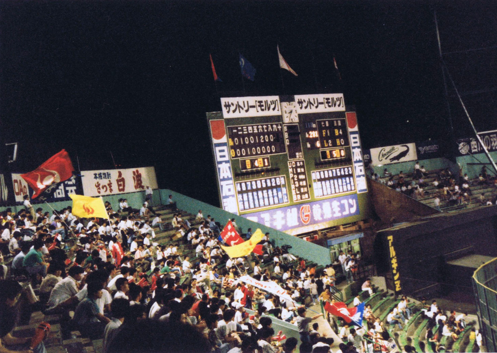 1990年シーズンの川崎球場のスコアボードは「10.19」を経て少し美しくなっていた